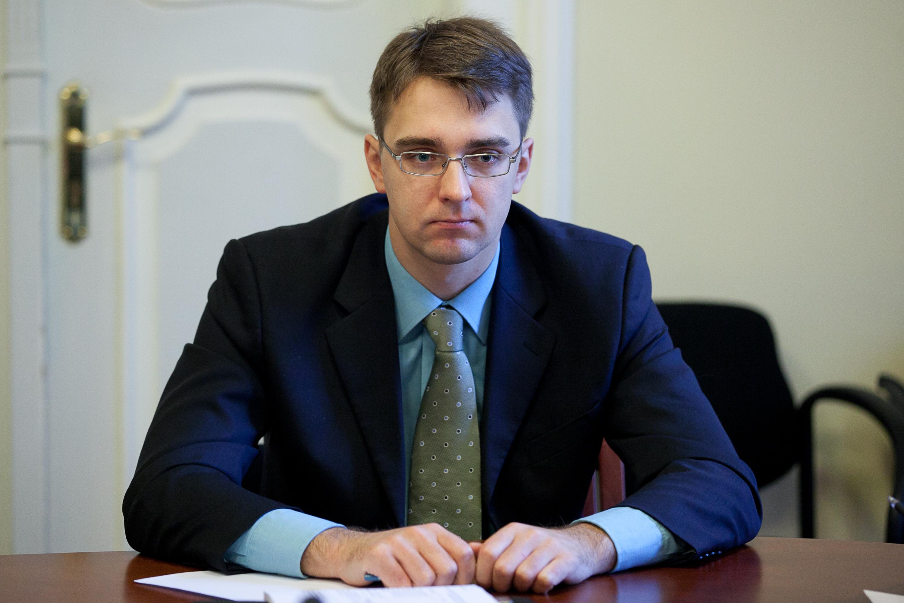 2012.gada 14.novembris. Ārlietu komisijas sēde. Foto: Ernests Dinka, Saeimas Kanceleja